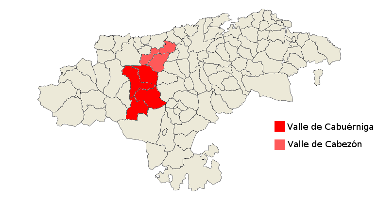 Mapa de localicación del Valle del Saja, Cantabria, España